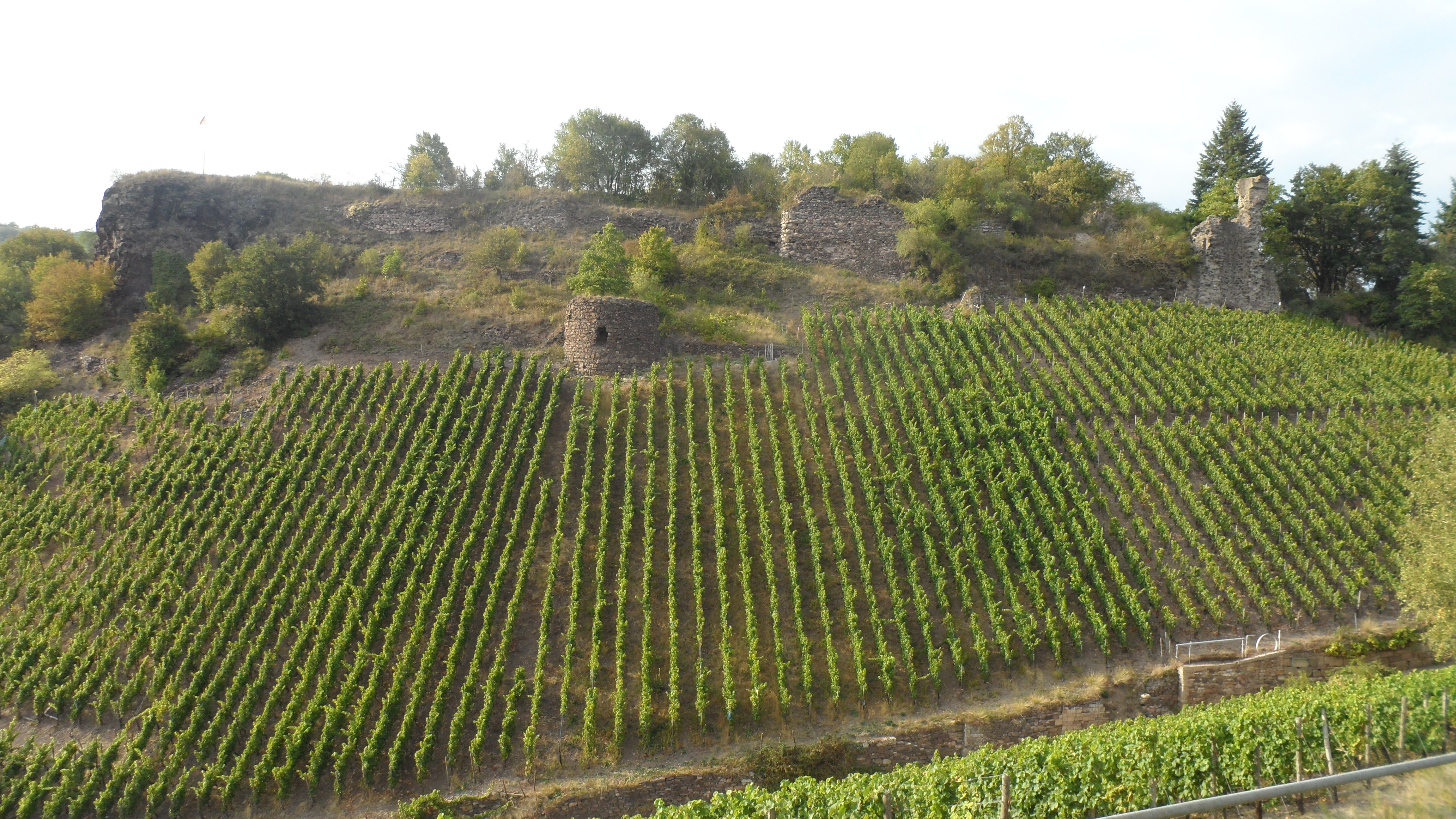 Schlossböckelheim.Denkmalzone Burgruine Schloßböckelheim.